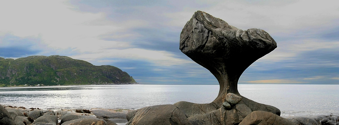 Der Kannesteinen auf der Insel Vågsøy, Sogne og Fjordane, Norwegen – Panorama aus drei Querformaten EOS 350 D, Sigma 18mm